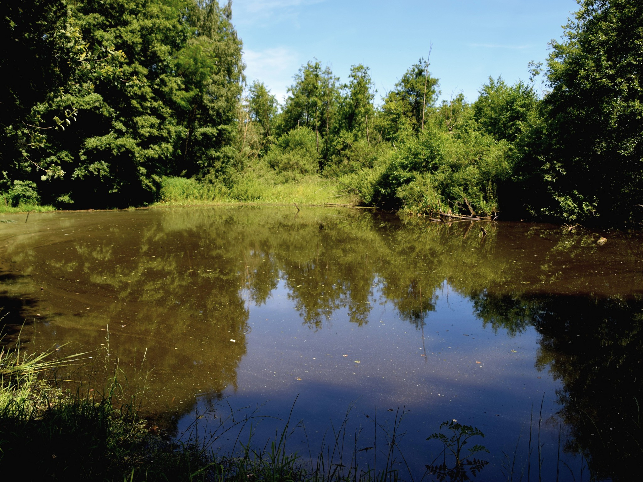 Maserpfuhl im Märkischer Naturgarten in Frankfurt (Oder)-Güldendorf